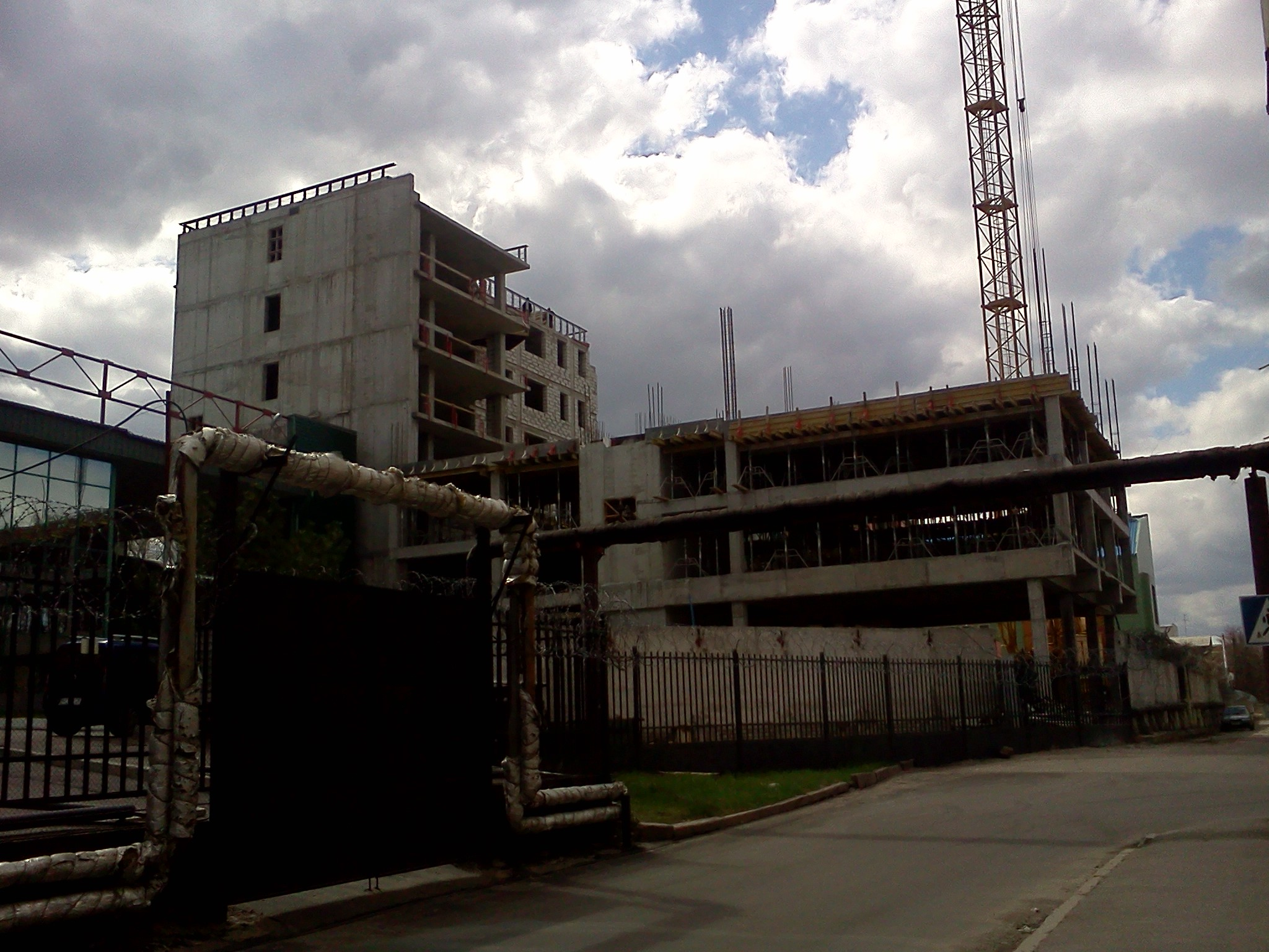 Будівництво нового корпусу готелю "Космополіт".